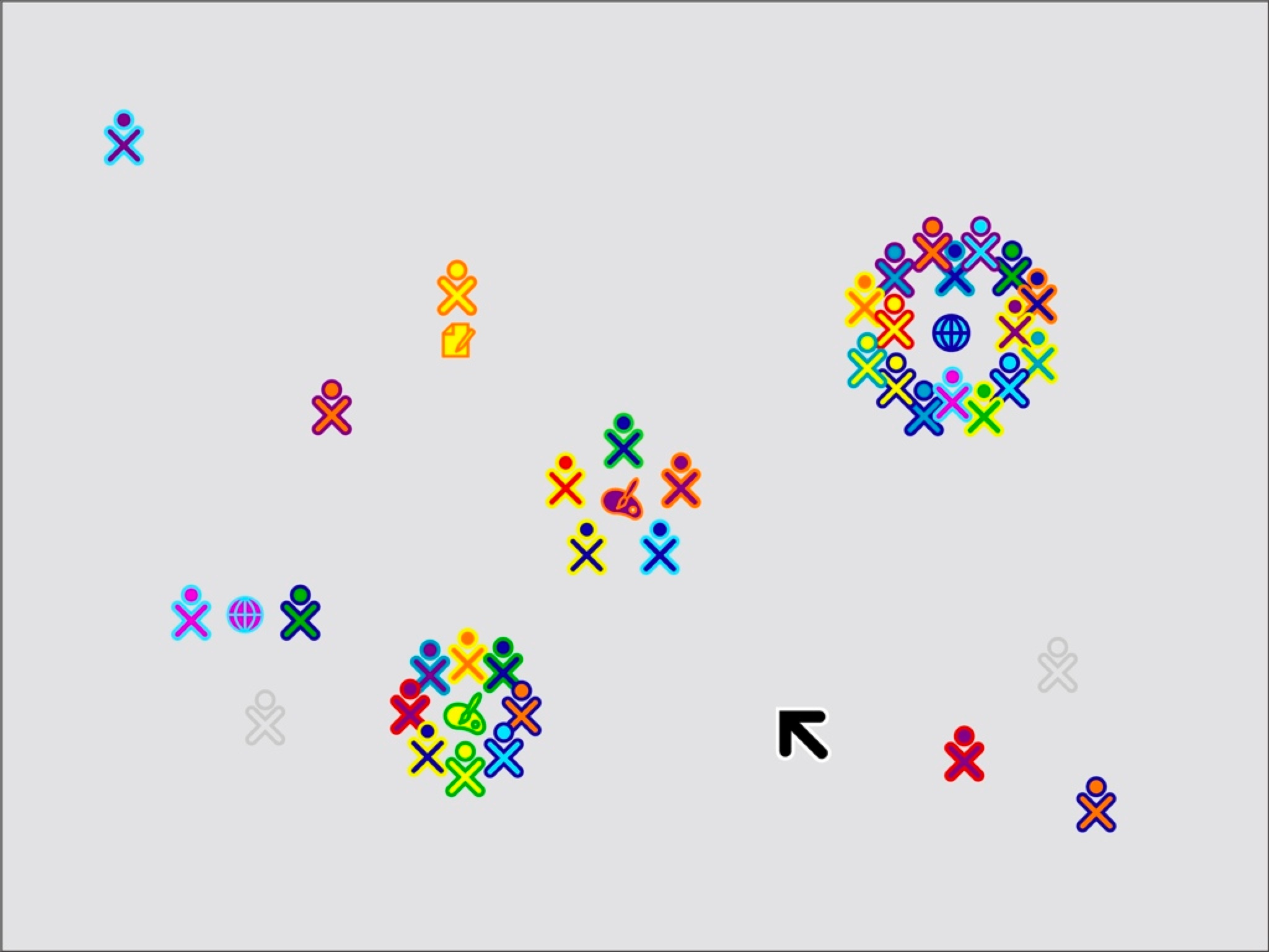 OLPC: XO laptop - GUI "Sugar": neighbourhood view